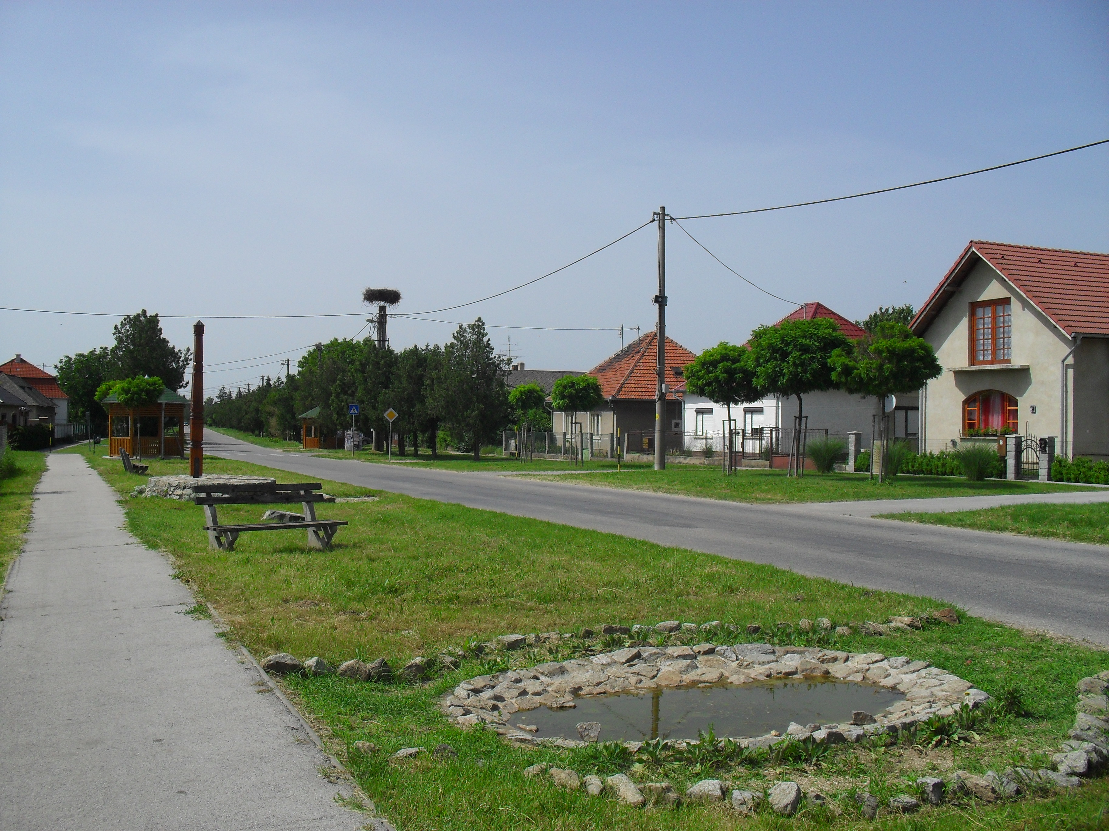 Virt - utcakép